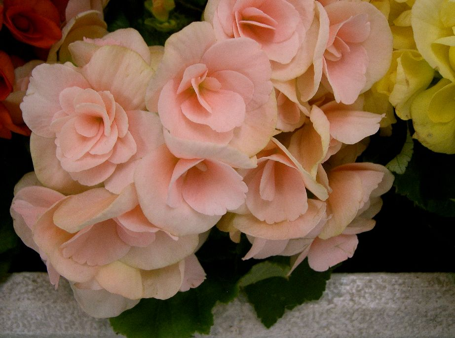 Begonia